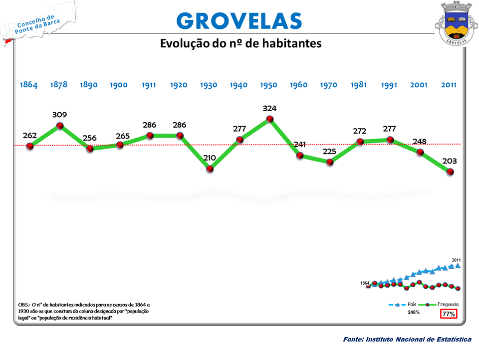 Censos 1864/2011